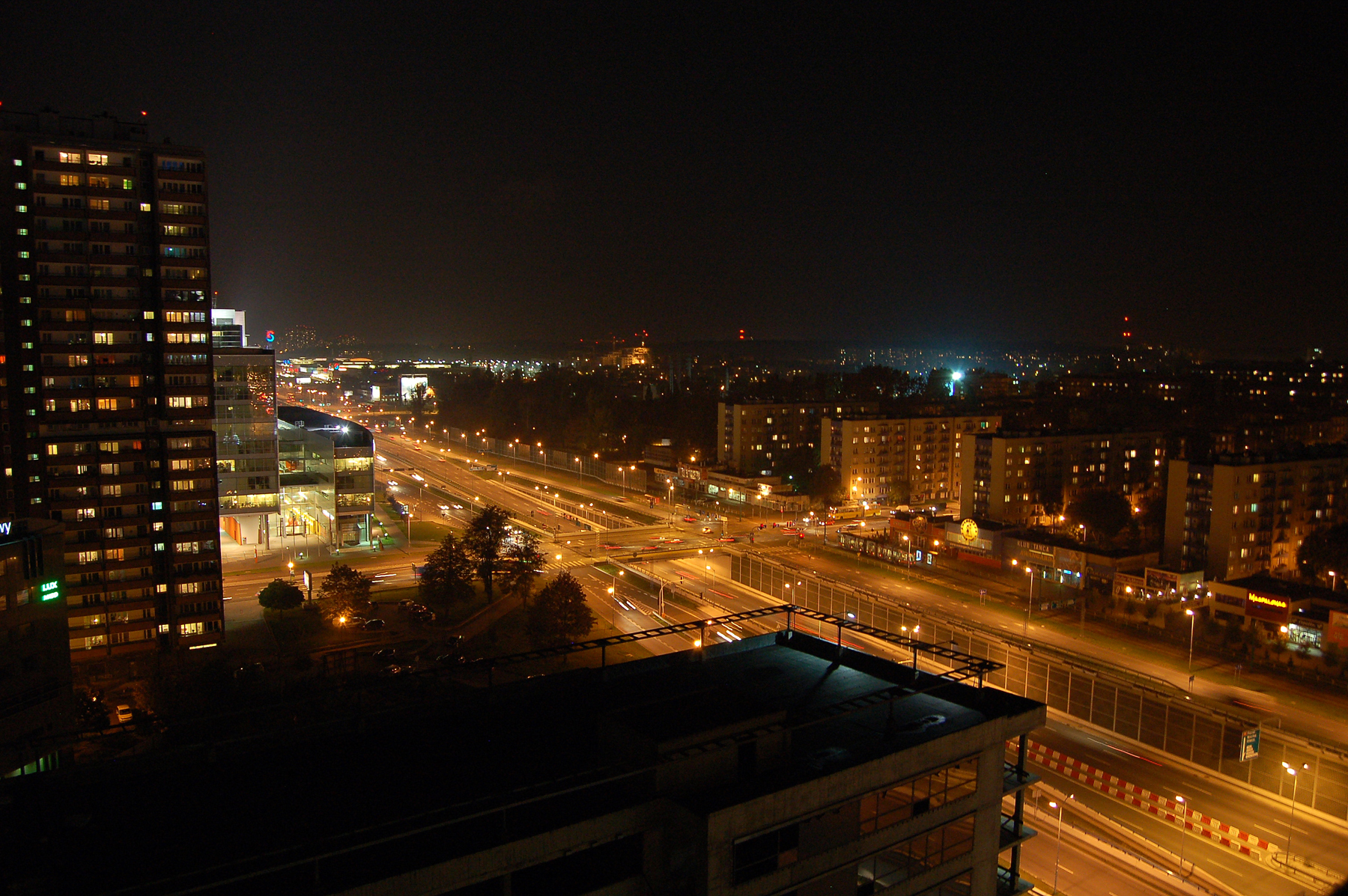 Skrzyżowanie ulic Chorzowskiej i Sokolskiej - w tle ING Bank Śląski oraz Silesia City Center